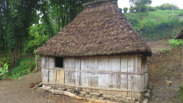 Riheu